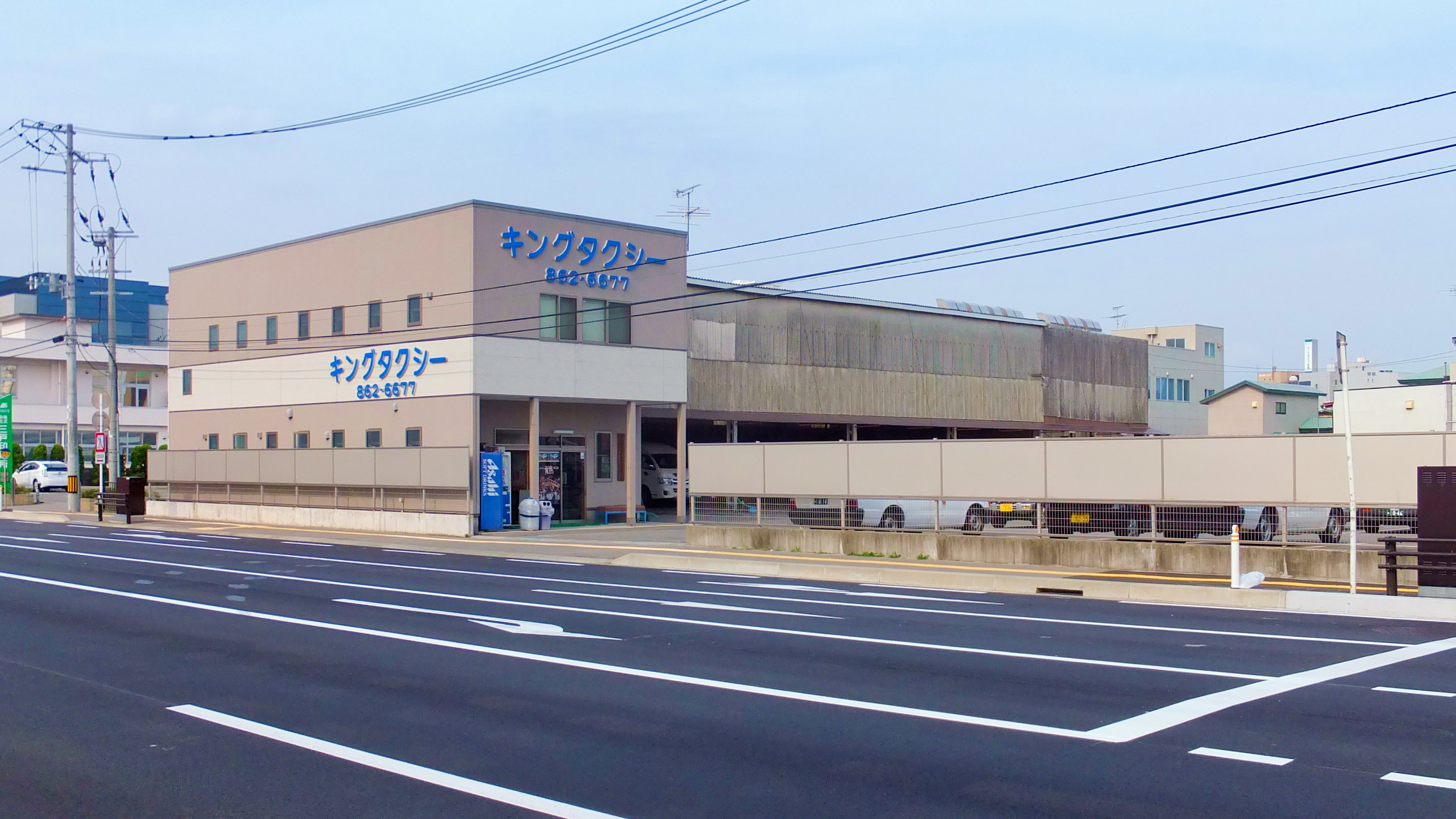 キングタクシー本社（秋田市旭北錦町）